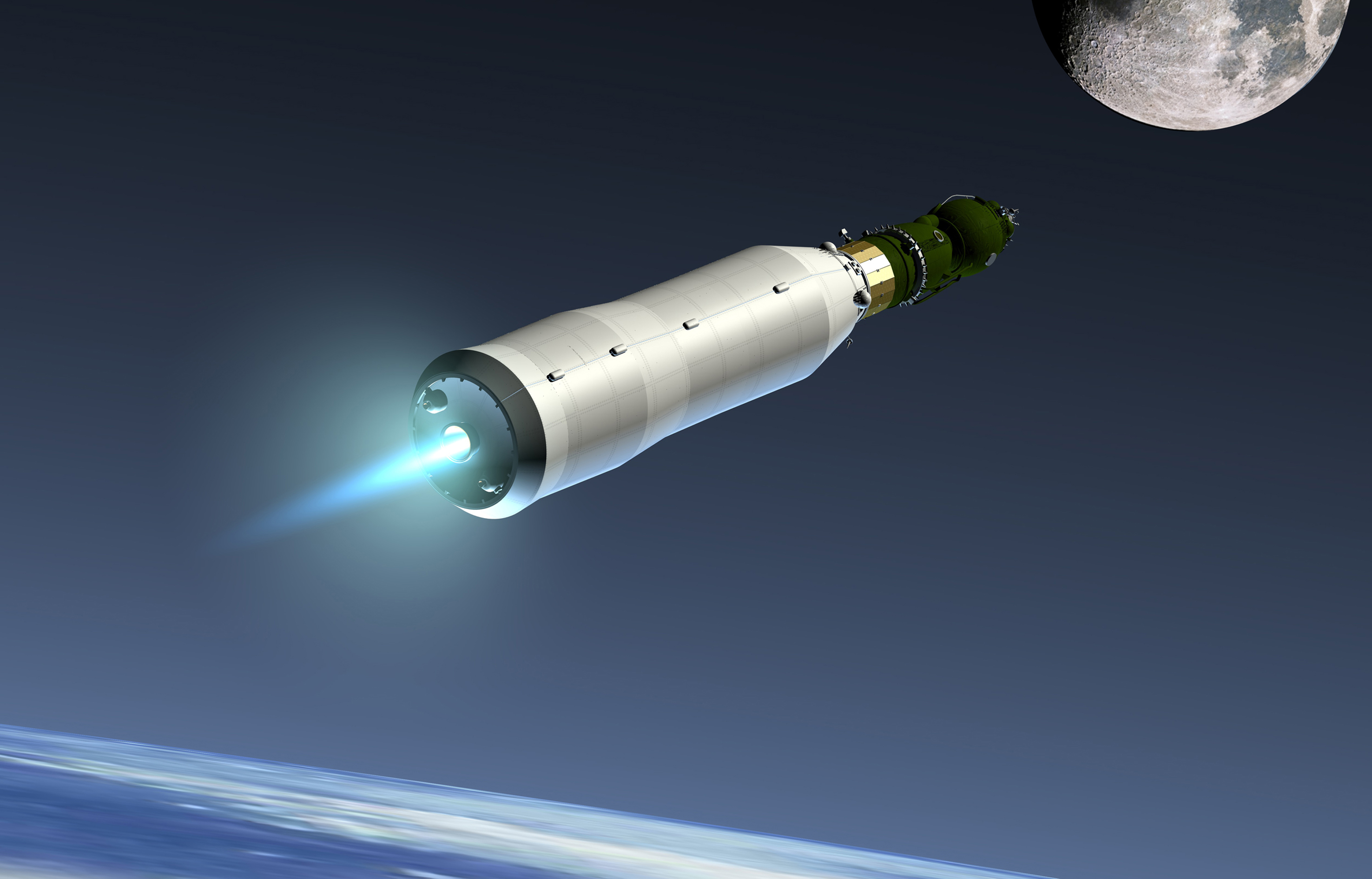 Darstellung eines sowjetischen Mondraumschiffes beim Einschuss in die Mondbahn